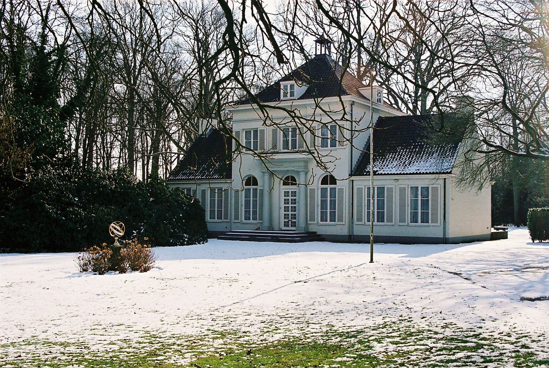 Huize Twijnmeer te Gemonde.